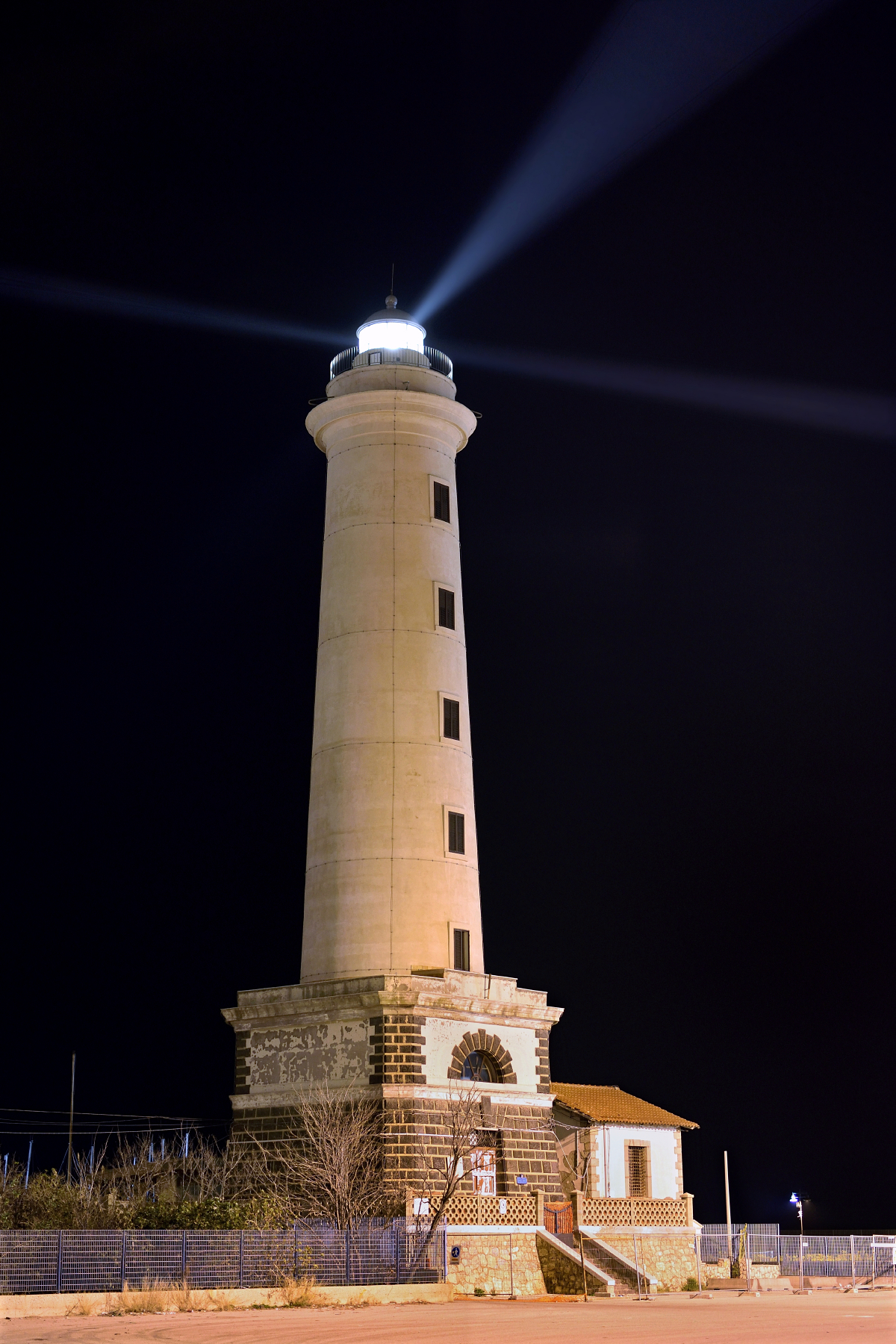 Faro San Giacomo, Licata